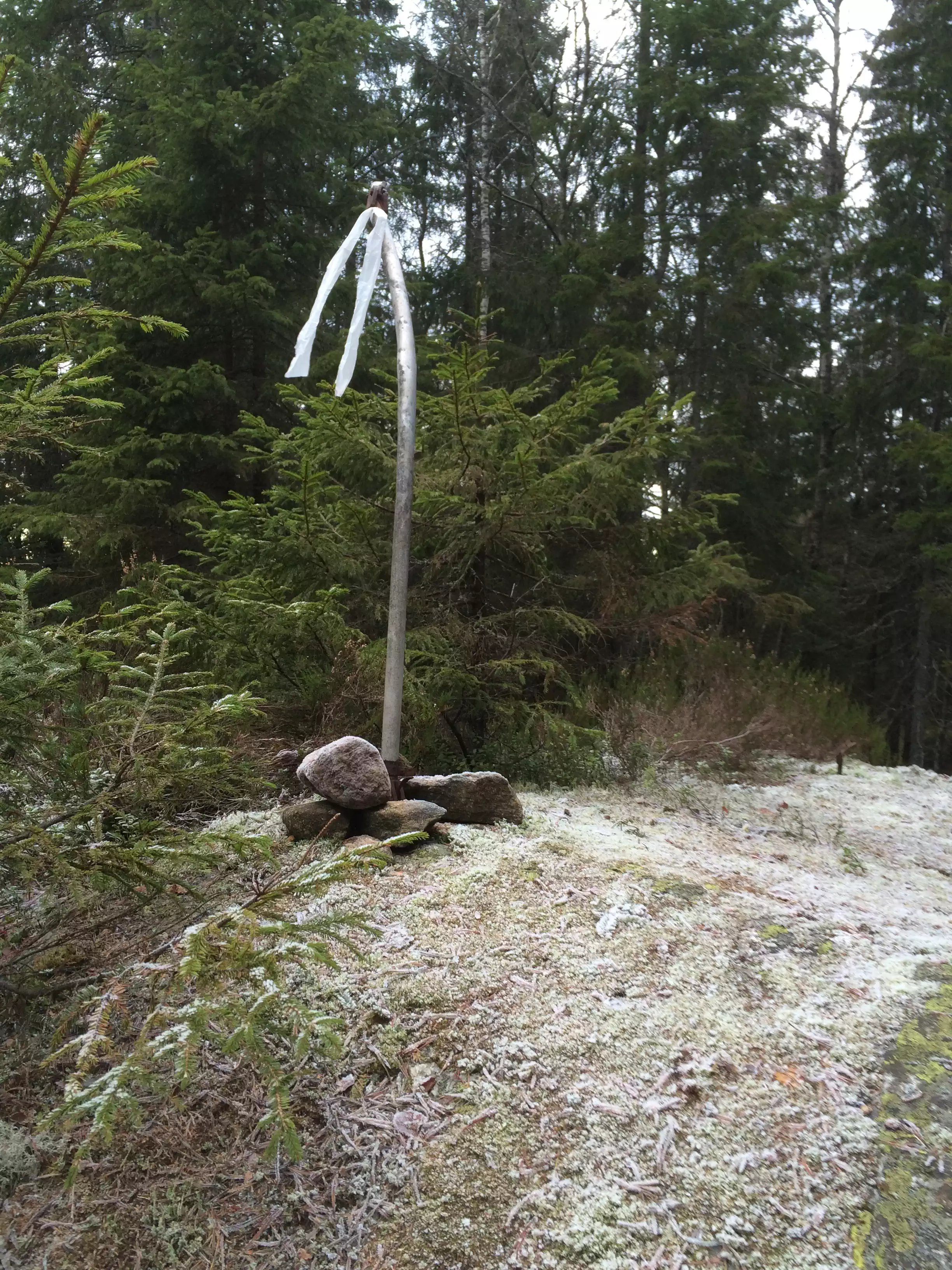 Aurskog-Hølands høyeste punkt på Runddelen.